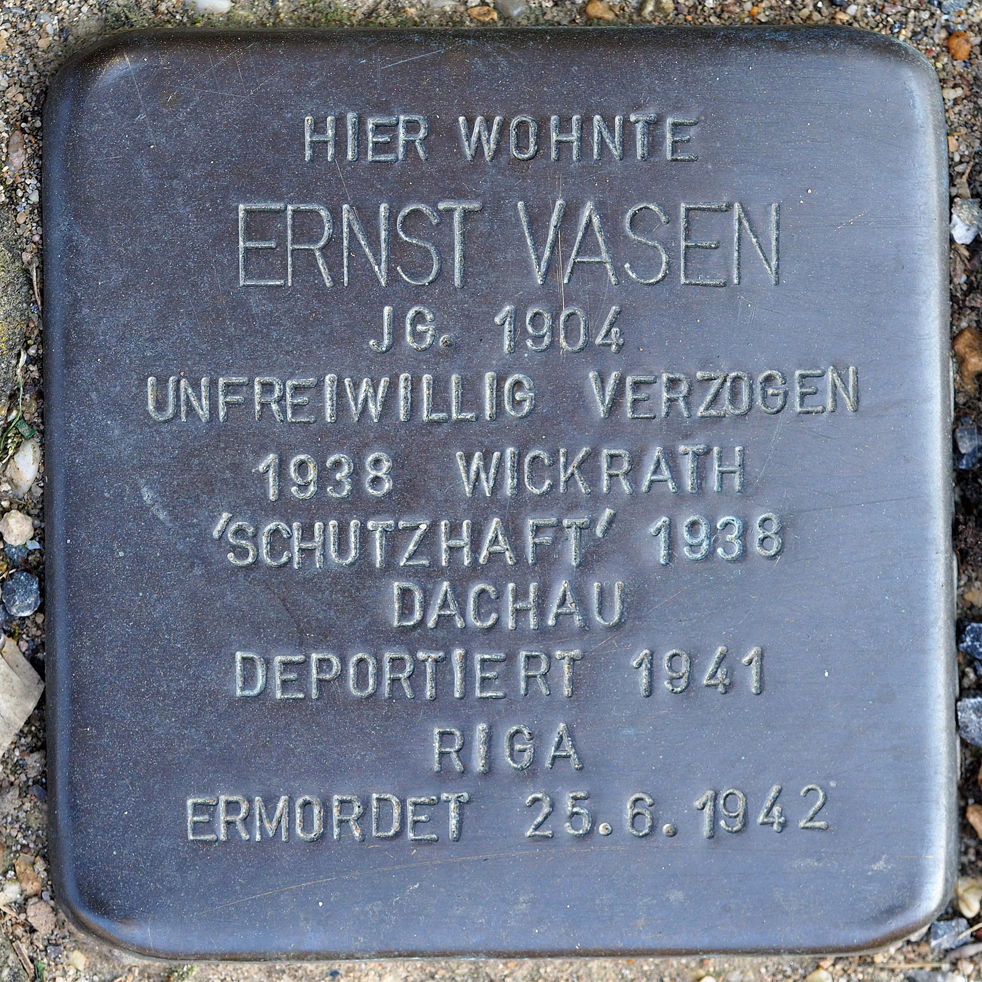 Stolpersteine GV: Vasen, Ernst